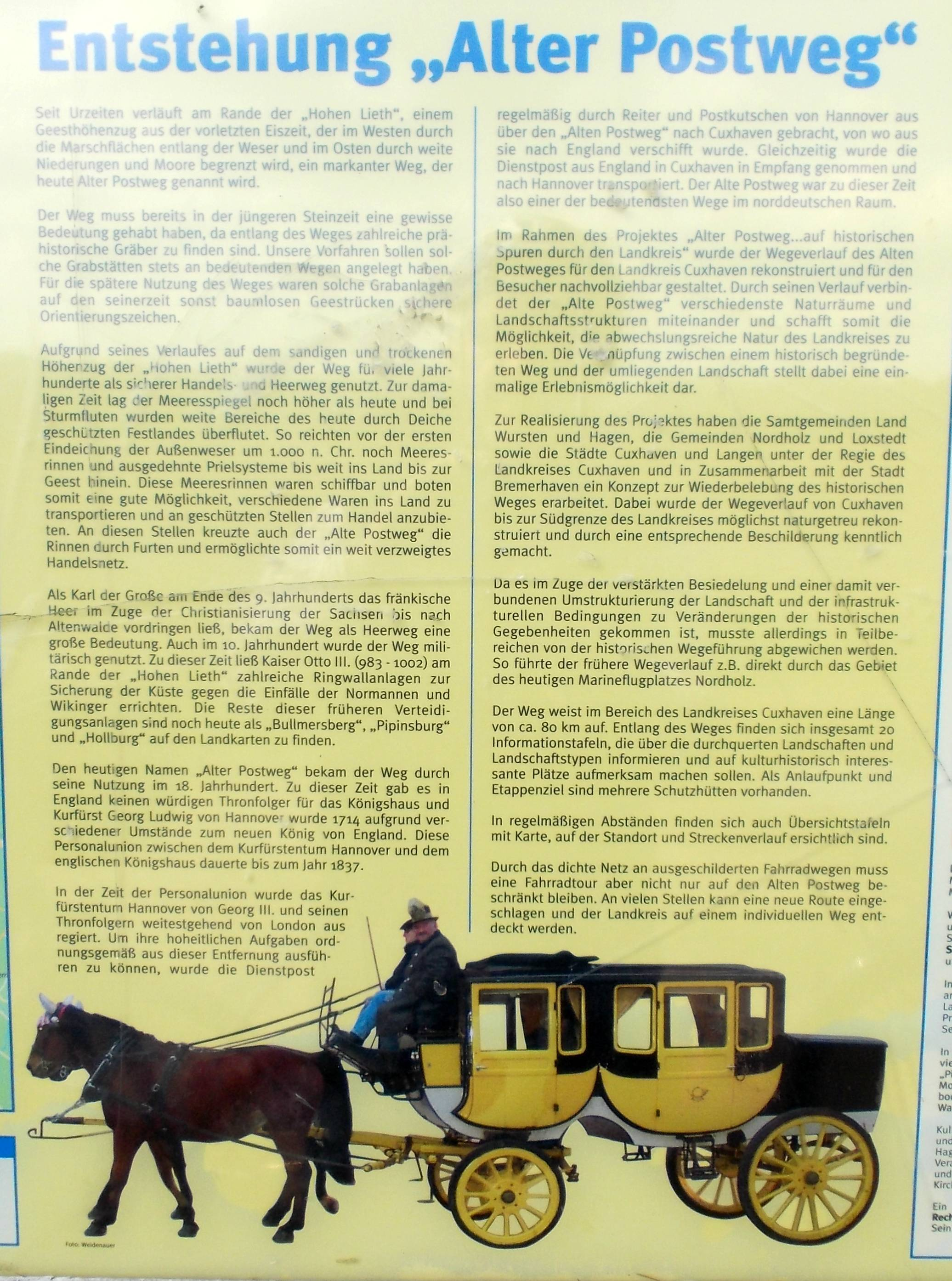 Informationtafel am Alten Postweg nahe dem Bramstedter Wasserwerk über die Geschichte des "Alten Postwegs"